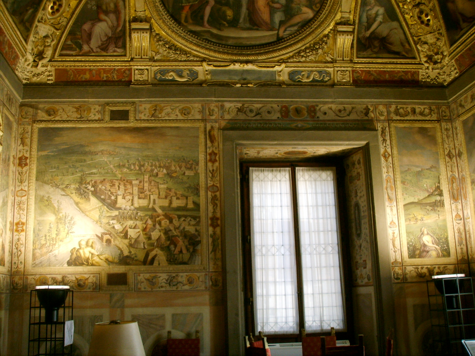 Sala di Clemente VII, episodi bellici